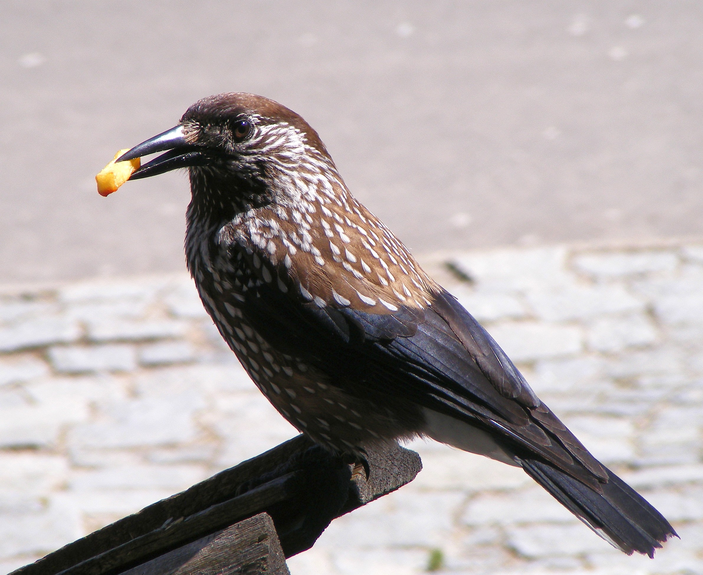 Orzechówka, orzechówka zwyczajna (Nucifraga caryocatactes). Zdjęcie wykonane na polanie Włosienica pod Morskim Okiem w Tatrach, ptak podkradał turystom frytki.